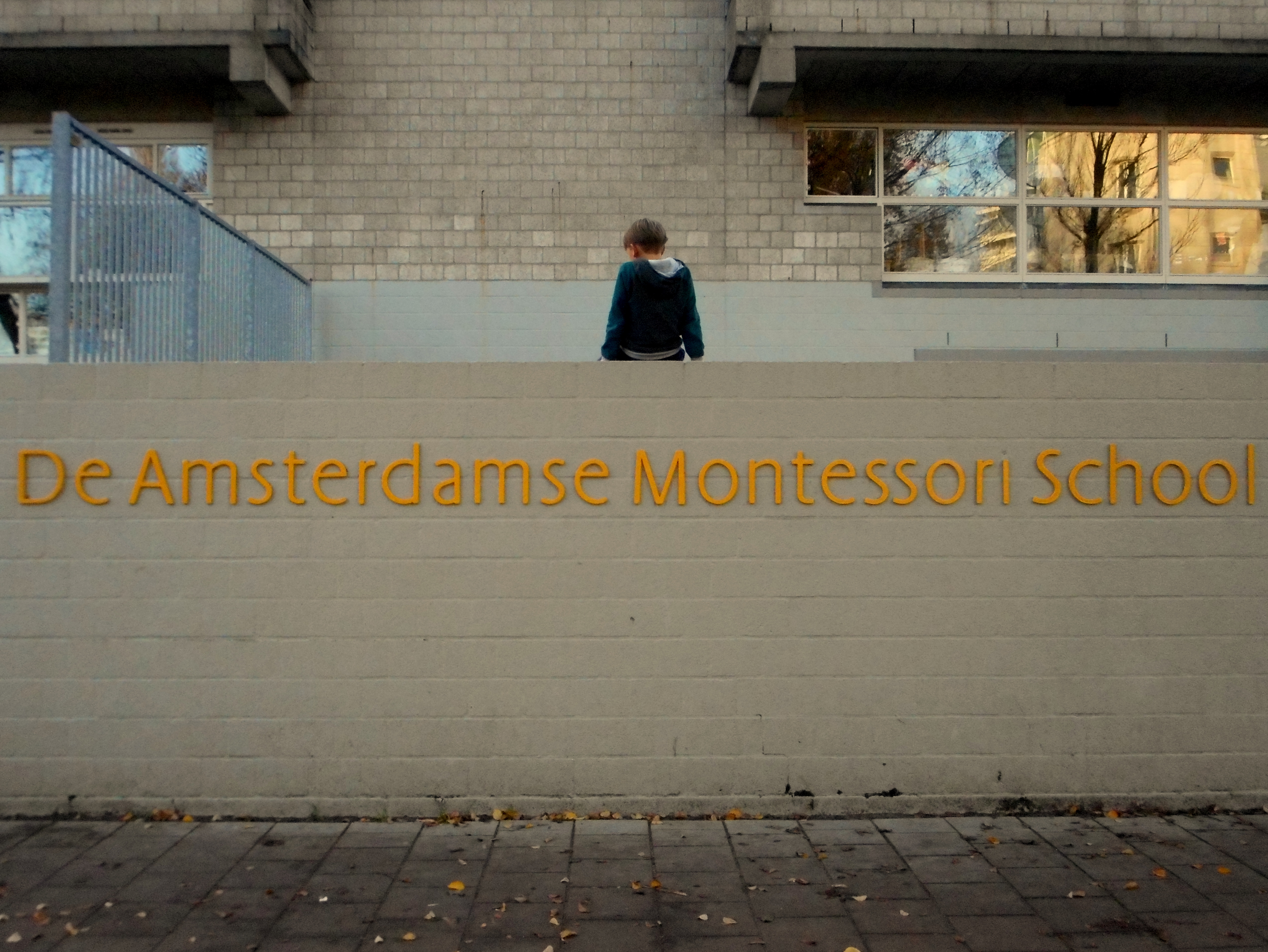 Σχολείο Μοντεσόρι